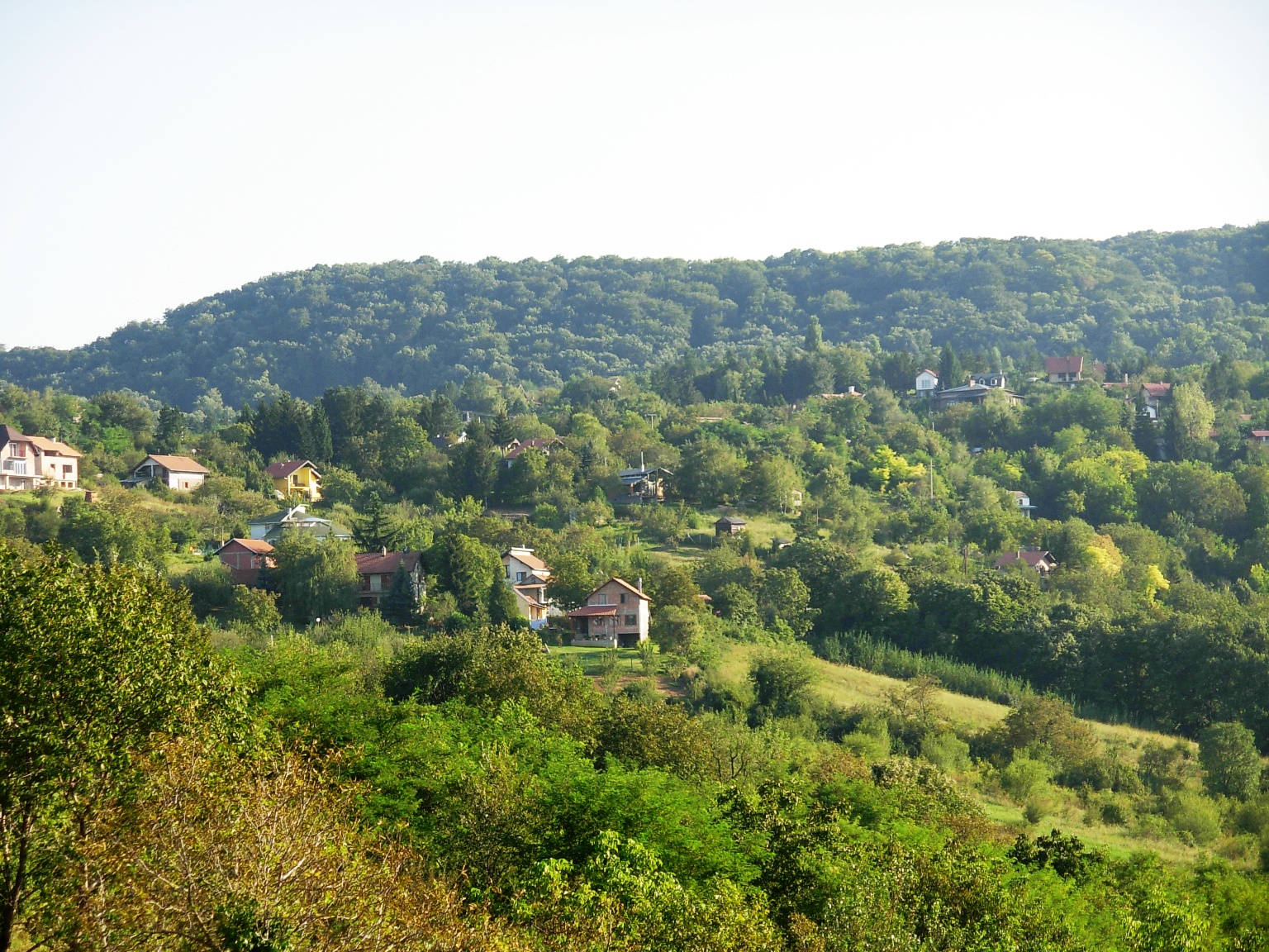 Pogled na gornji deo Popovice sa Fruškogorskog puta.